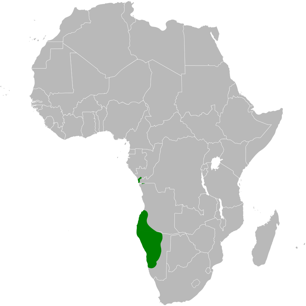 Achaetops pycnopygius distribution map, based on